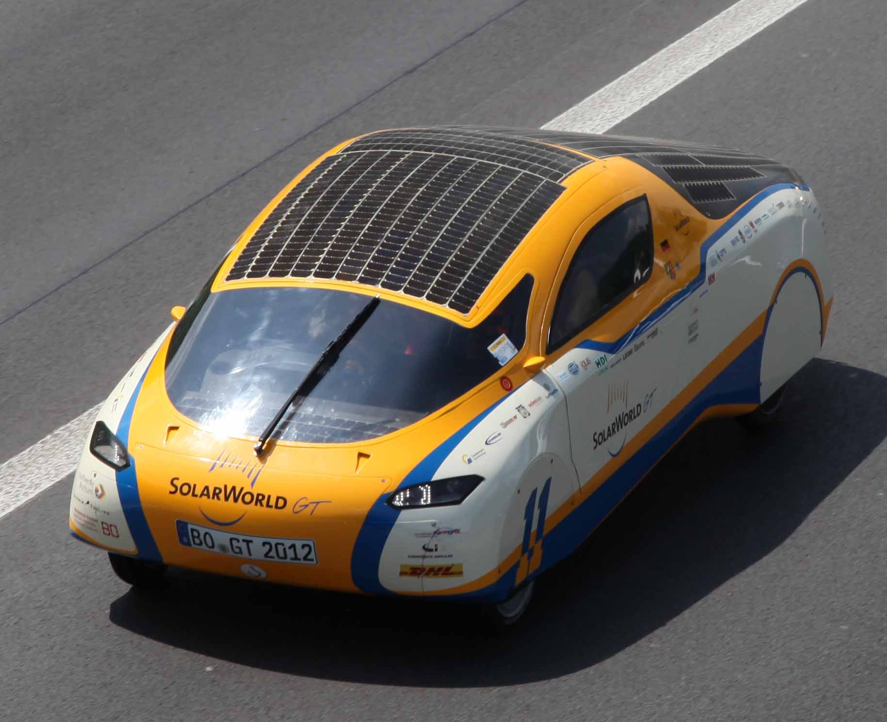 Solarworld_GT auf der B1